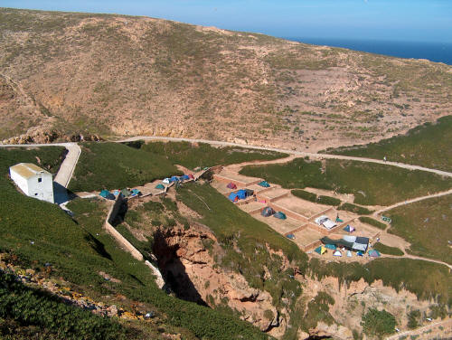 Campismo em Berlengas. En vert foncé, une espèce introduite et invasive, le Mesembryanthemum cristalinum (en portugais : chorão), couvre de très grandes surfaces.